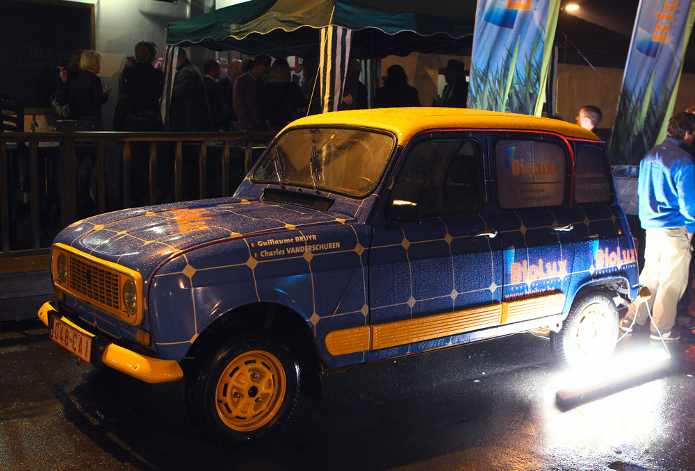 Photo de la Renault 4L GTL de l'équipage 1308 (4Lephants) de l'édition 2011 du 4L trophy.